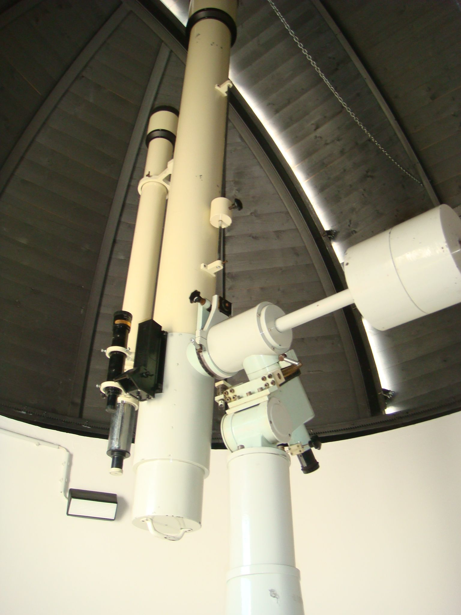 Coudé-Refraktor auf deutscher Wachter-Montierung